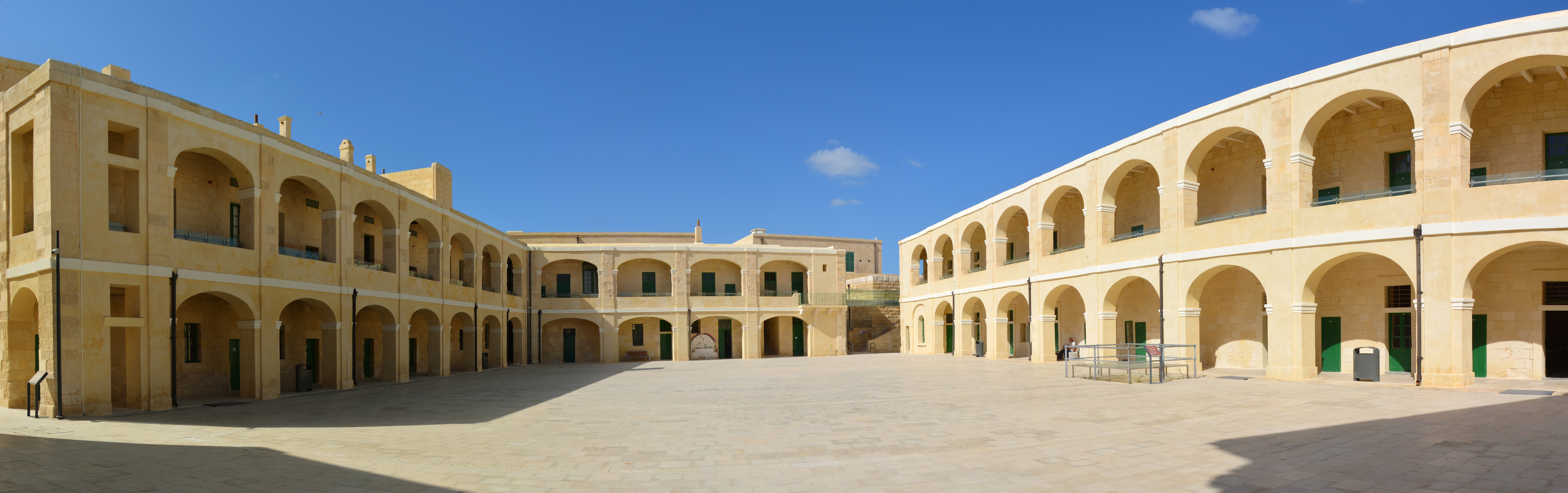 Cour intérieure du Fort Saint Elme, La Valette, Malte